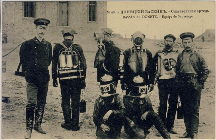 Донецкий бассейн. Спасательная станция